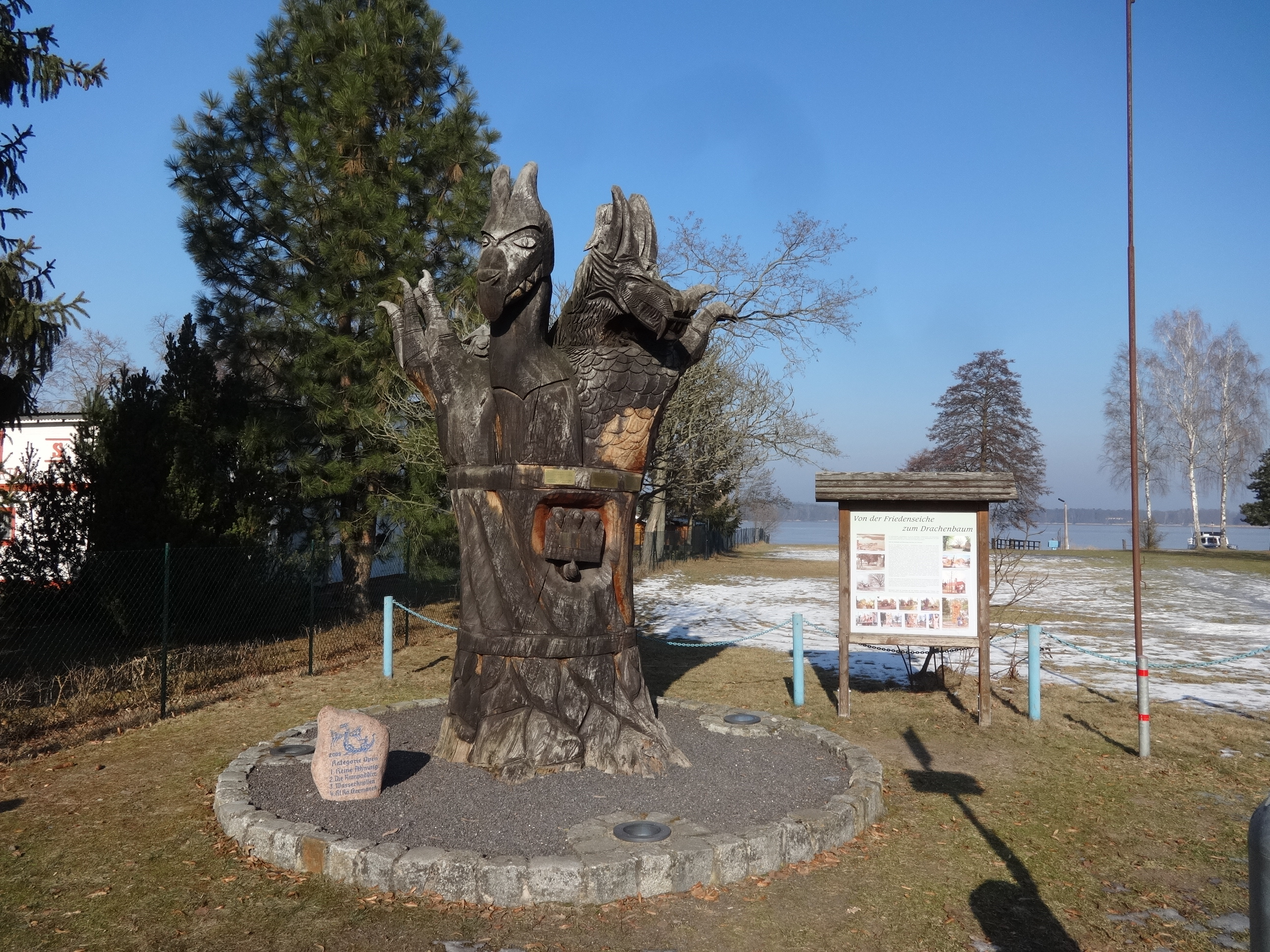 Klein Köris, ein Ortsteil der Gemeinde Groß Köris im Landkreis Dahme-Spreewald in Brandenburg